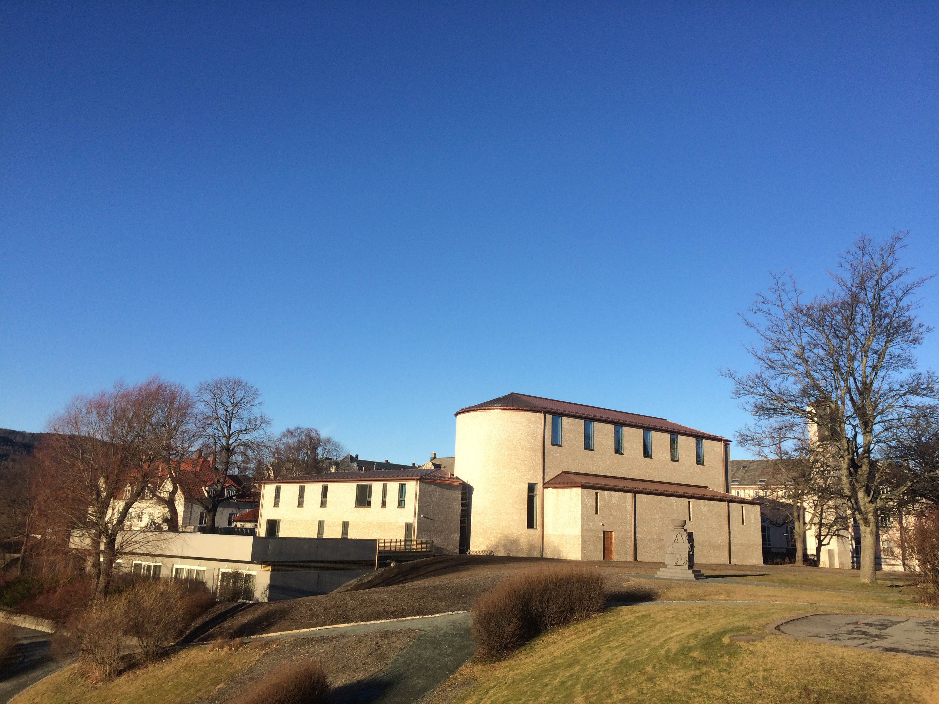 Nye St. Olav domkirke fra sørøst